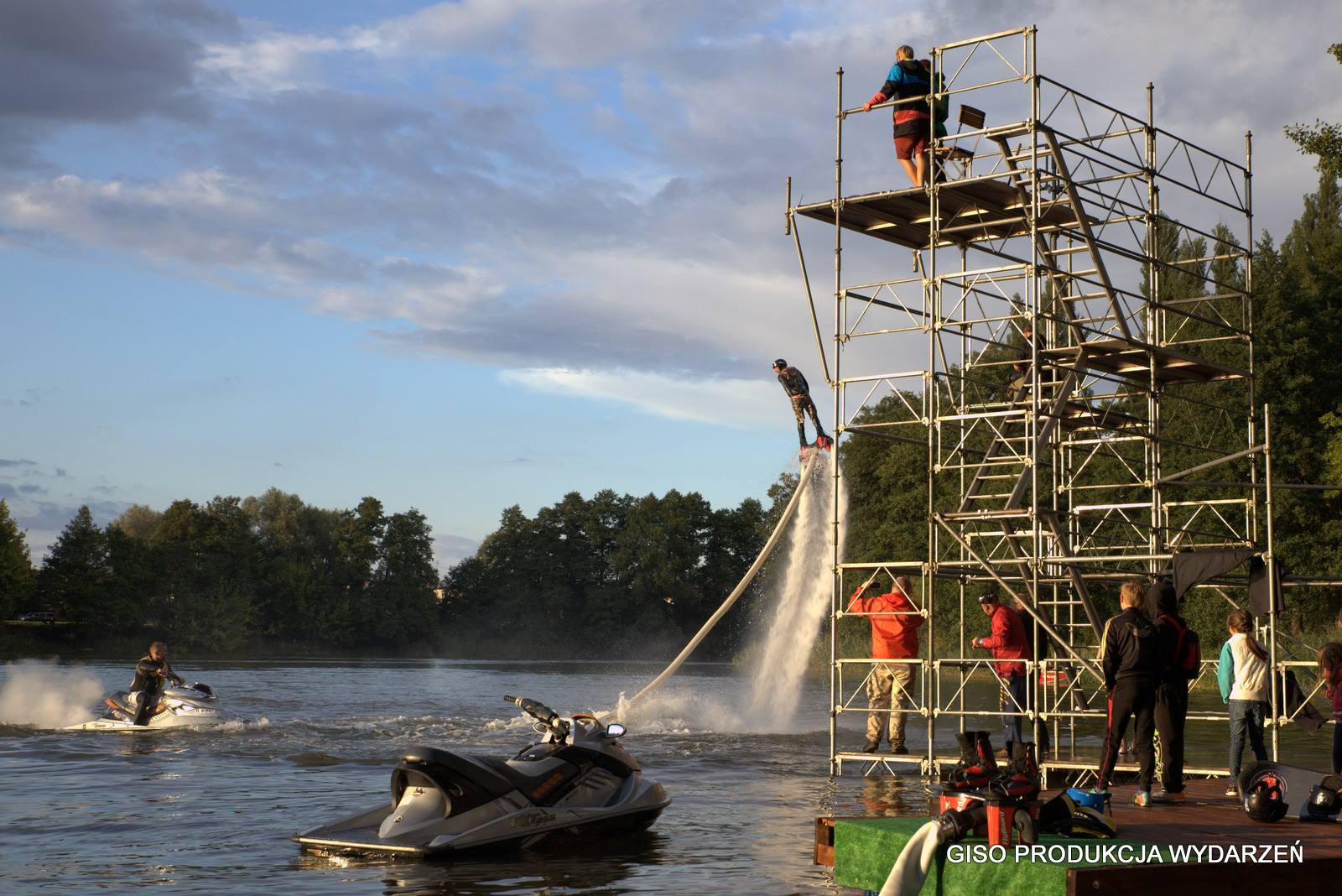 Robert Jaszczołd półfinałowy lot podczas Hydro-odrzutowych Mistrzostw Polski.